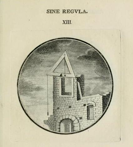 Illustration zur Benediktsregel